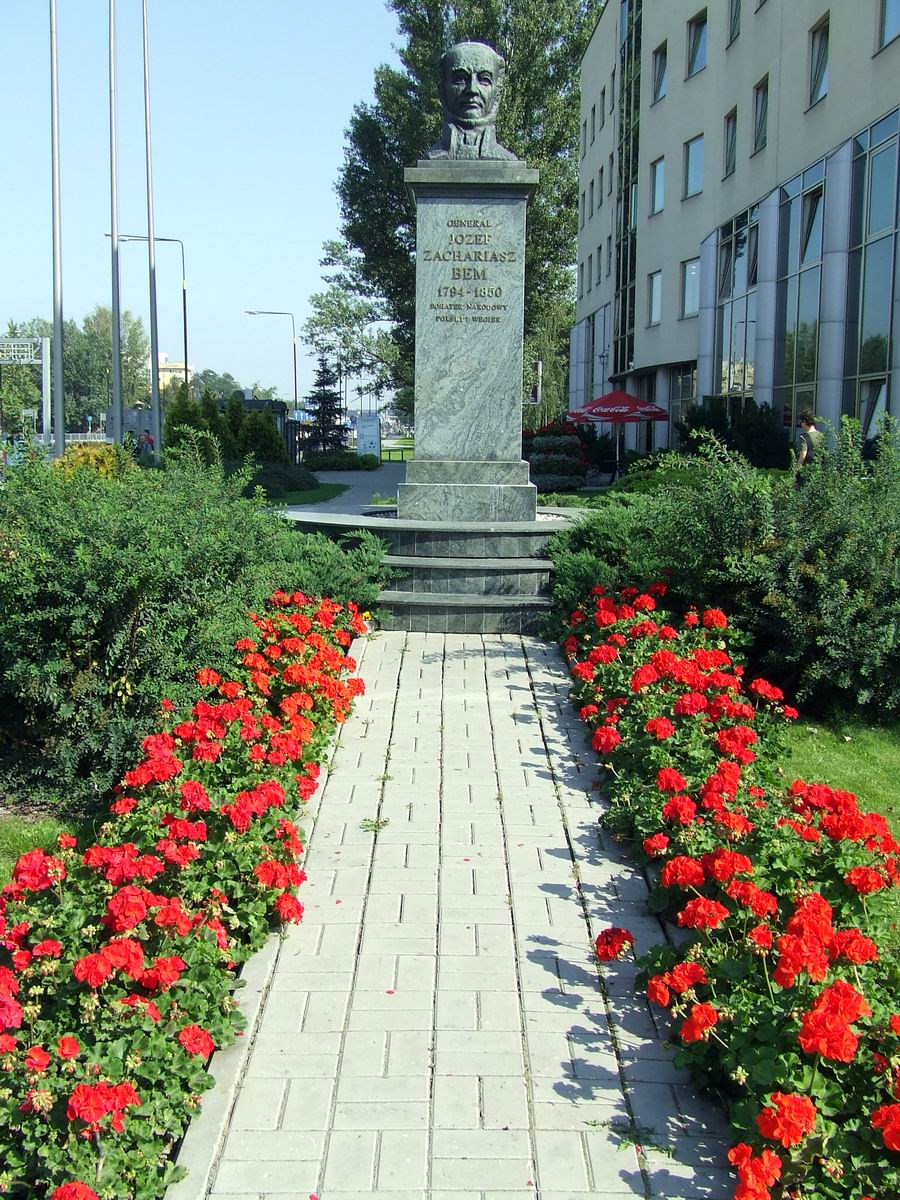 Pomnik gen. Józefa Bema przed Ratuszem na Bemowie